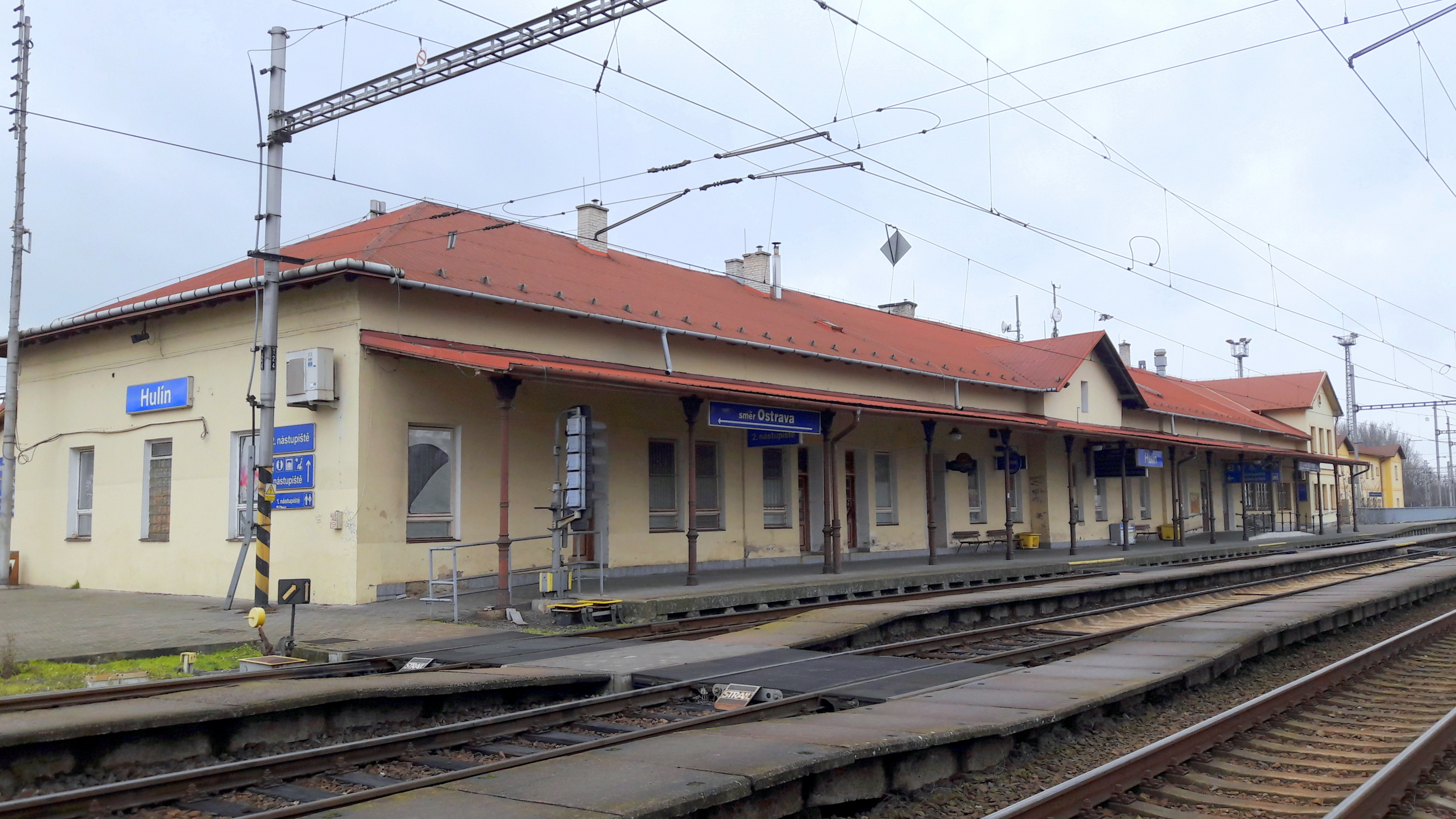 Hulín, vlakové nádraží